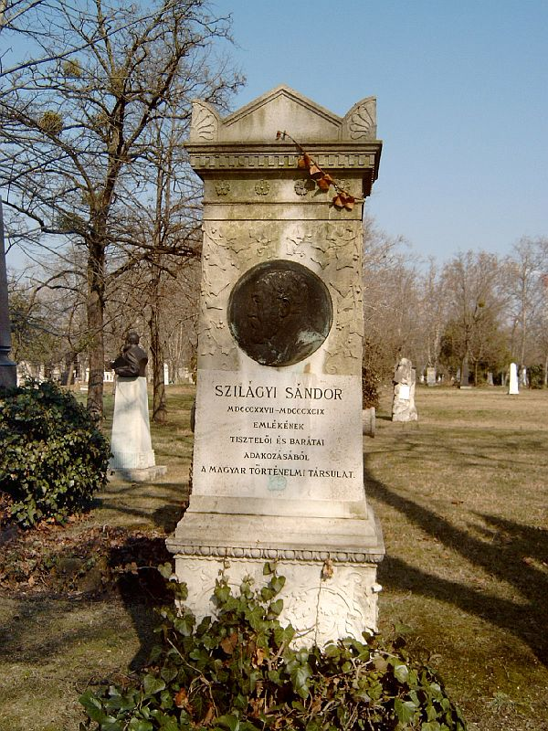 Szilágyi Sándor (Kolozsvár, 1827. aug. 30. – Bp., 1899, jan. 12.) történész sírja Budapesten. Kerepesi temető: 28-díszsor-3. [szobrász: Fadrusz János]